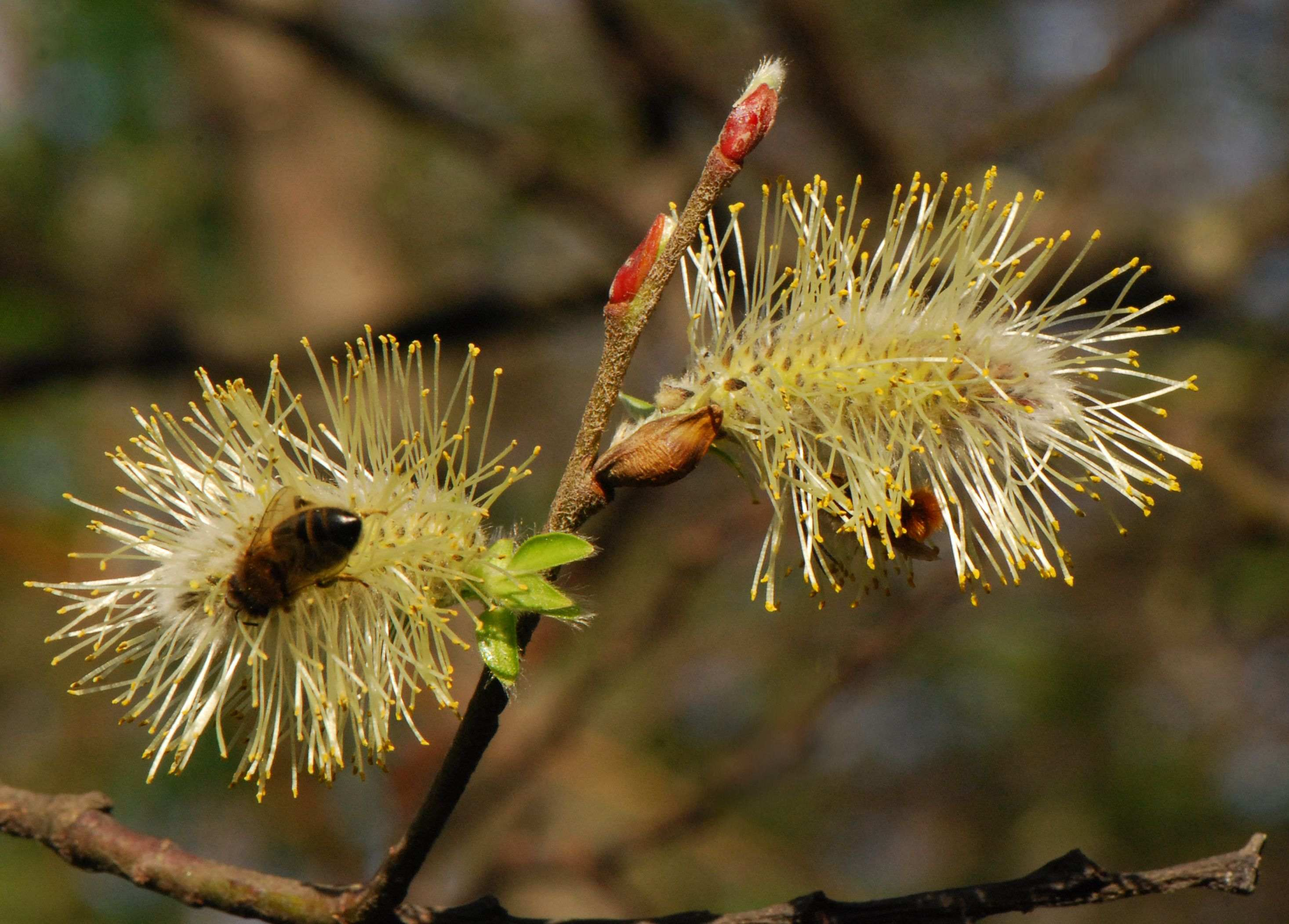 Salix caprea, Apis mellifera et Osmia cornuta, Jardin des Plantes, Paris